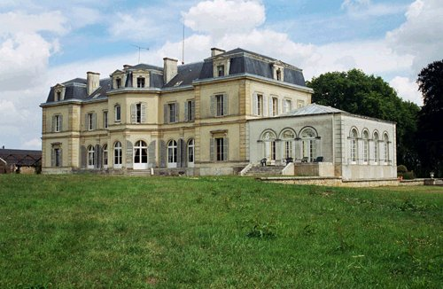 Vue arrière du Chateau des Moyeux